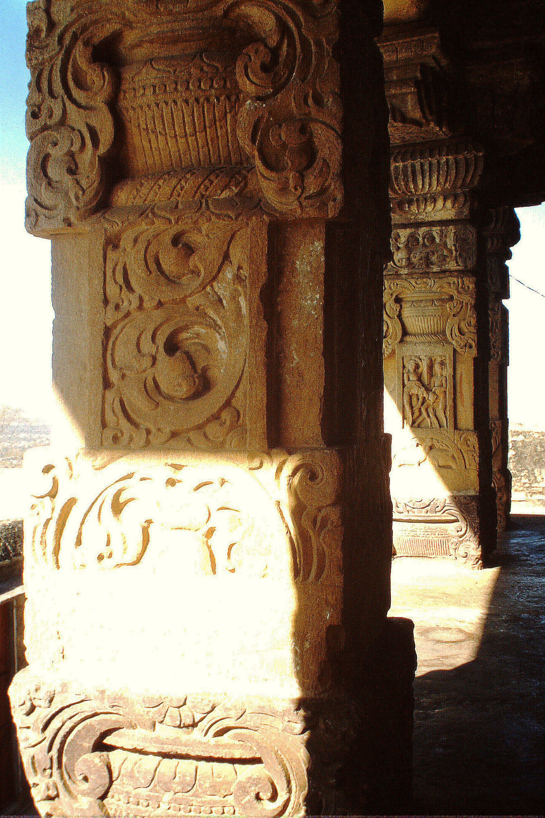 Chittorgarh, Kalika-Mata-Tempel (Detail)